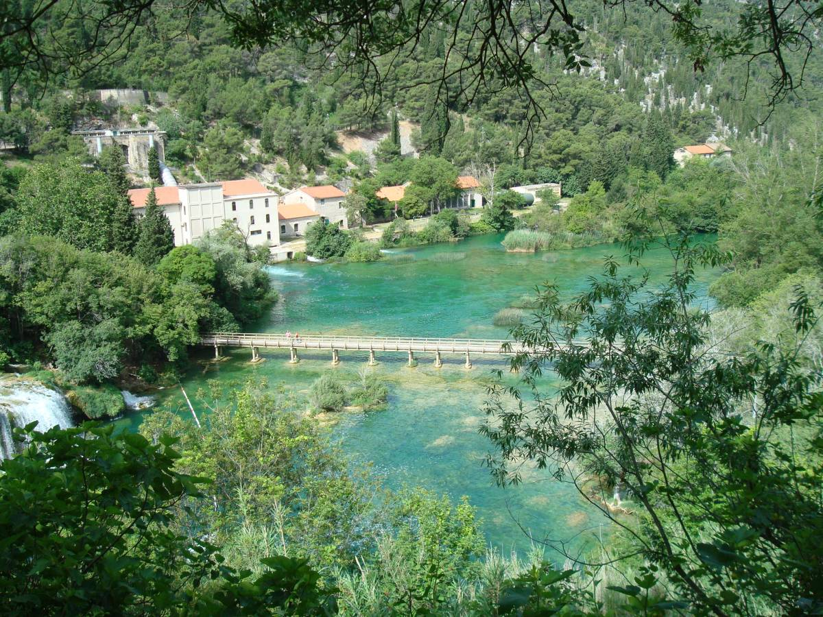 Vue de la centrale hydroélectrique et de la passerelle qui traverse le bassin du Krka